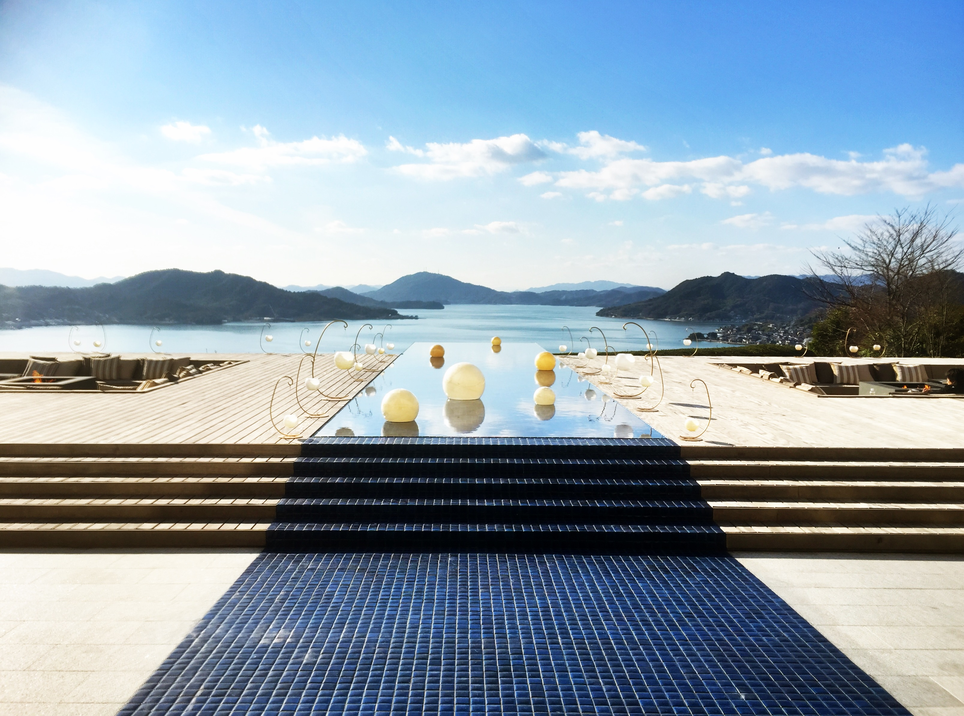 ベラビスタ スパ＆マリーナ尾道